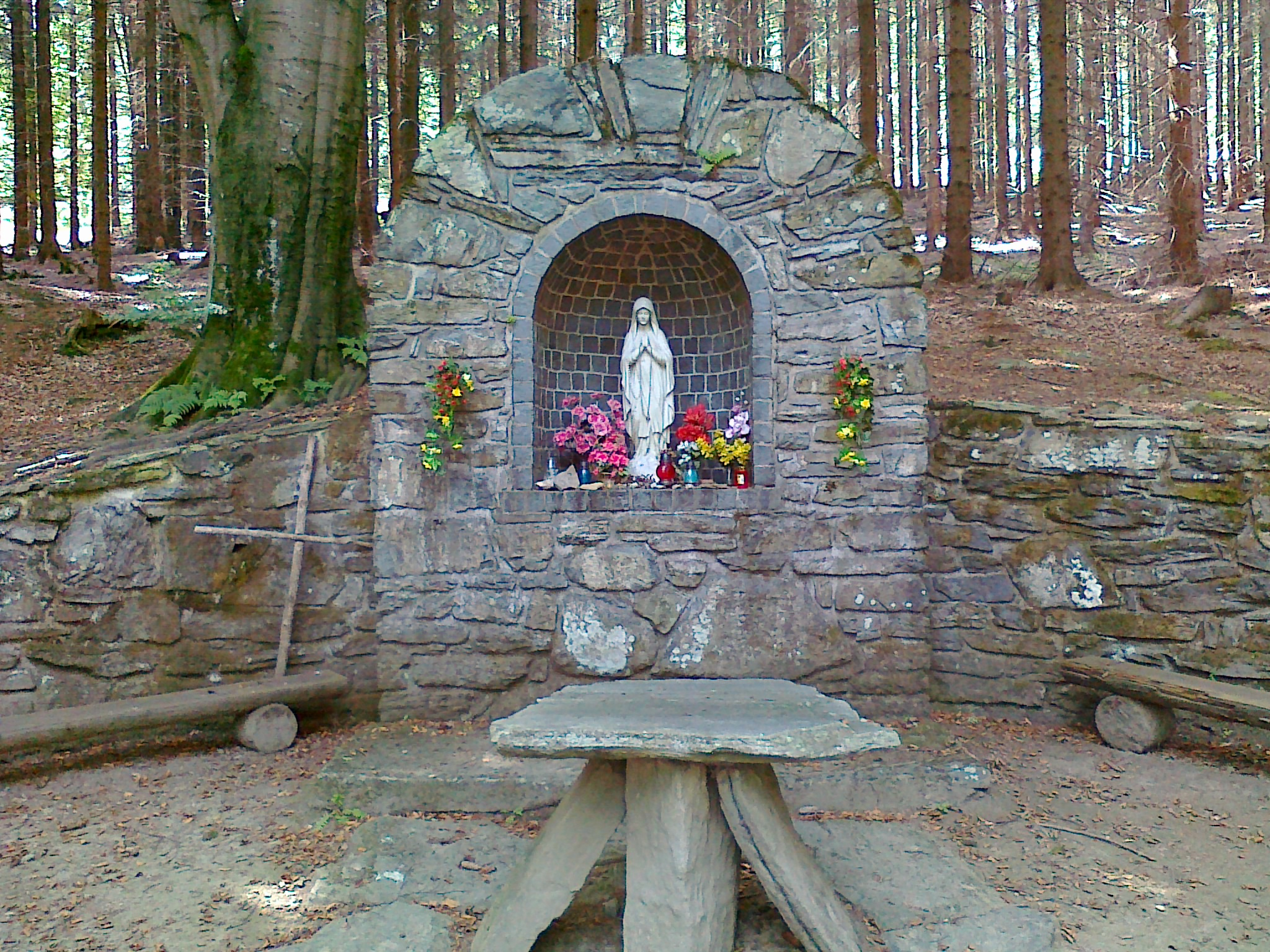 Jaskinia z figurą Matki Bożej nad źródłem Mariin Pramen